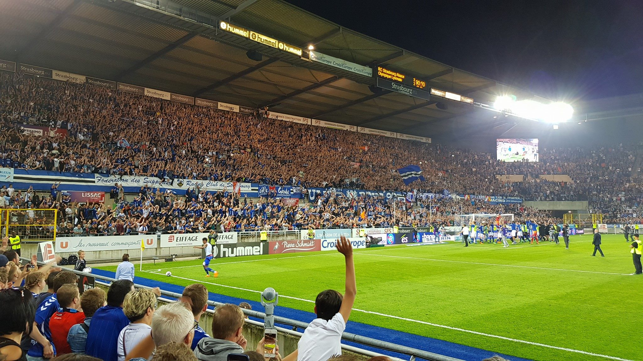 Rencontre de Ligue 1 au stade de la Meinau entre le racing club de strasbourg alsace et l'olympique lyonnais en mai 2018